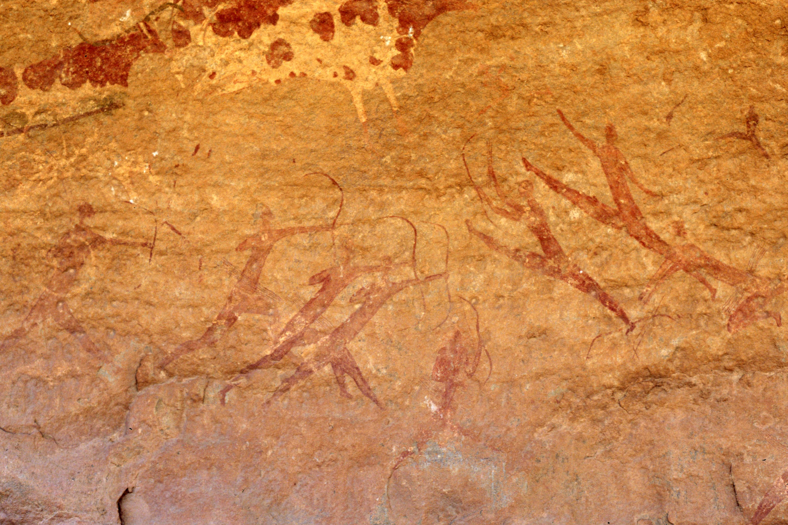 Algerien_5_0042